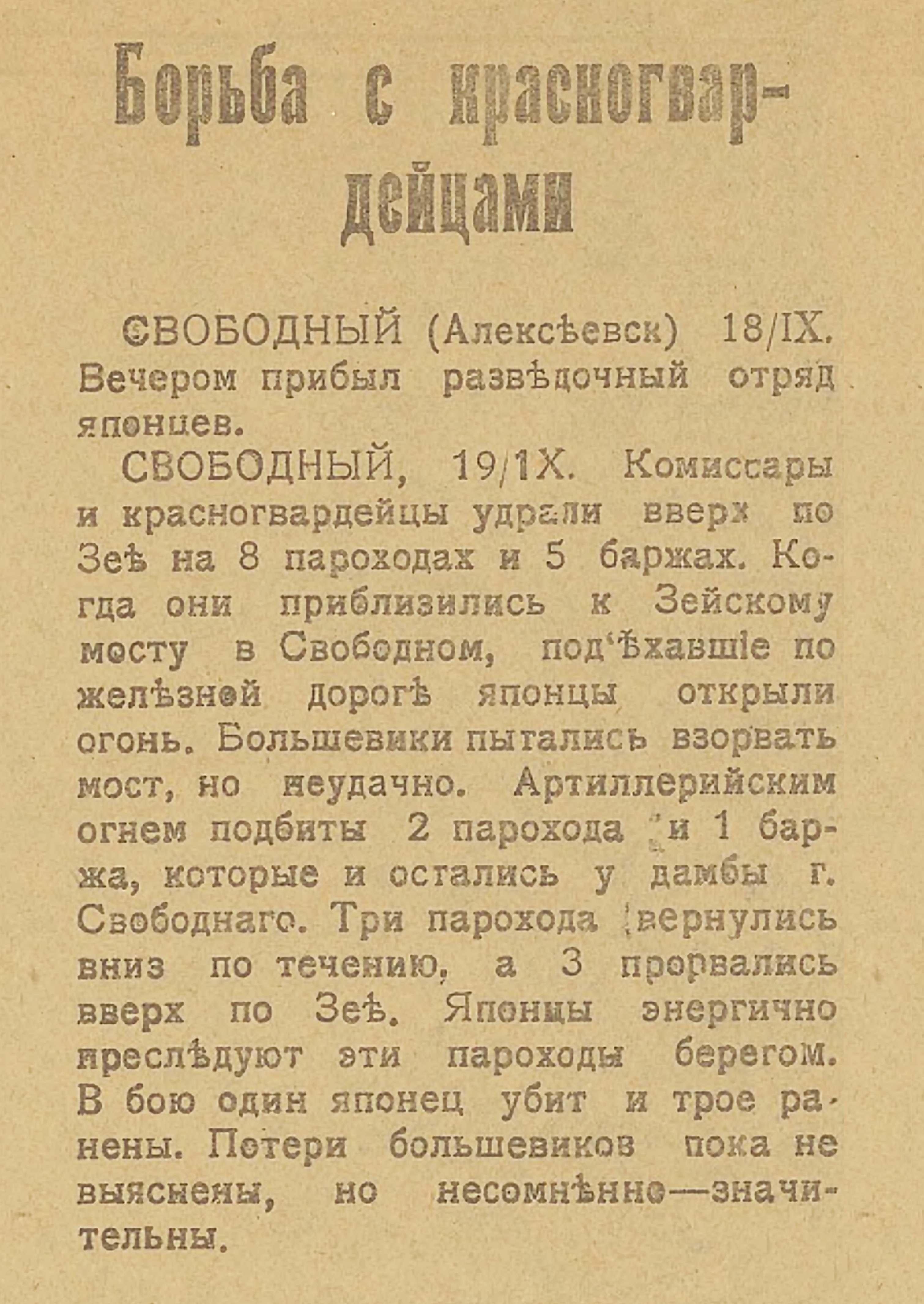 Сообщение об эвакуации советских войск из Амурской области в Бюллетене Временного правительства Амурской области